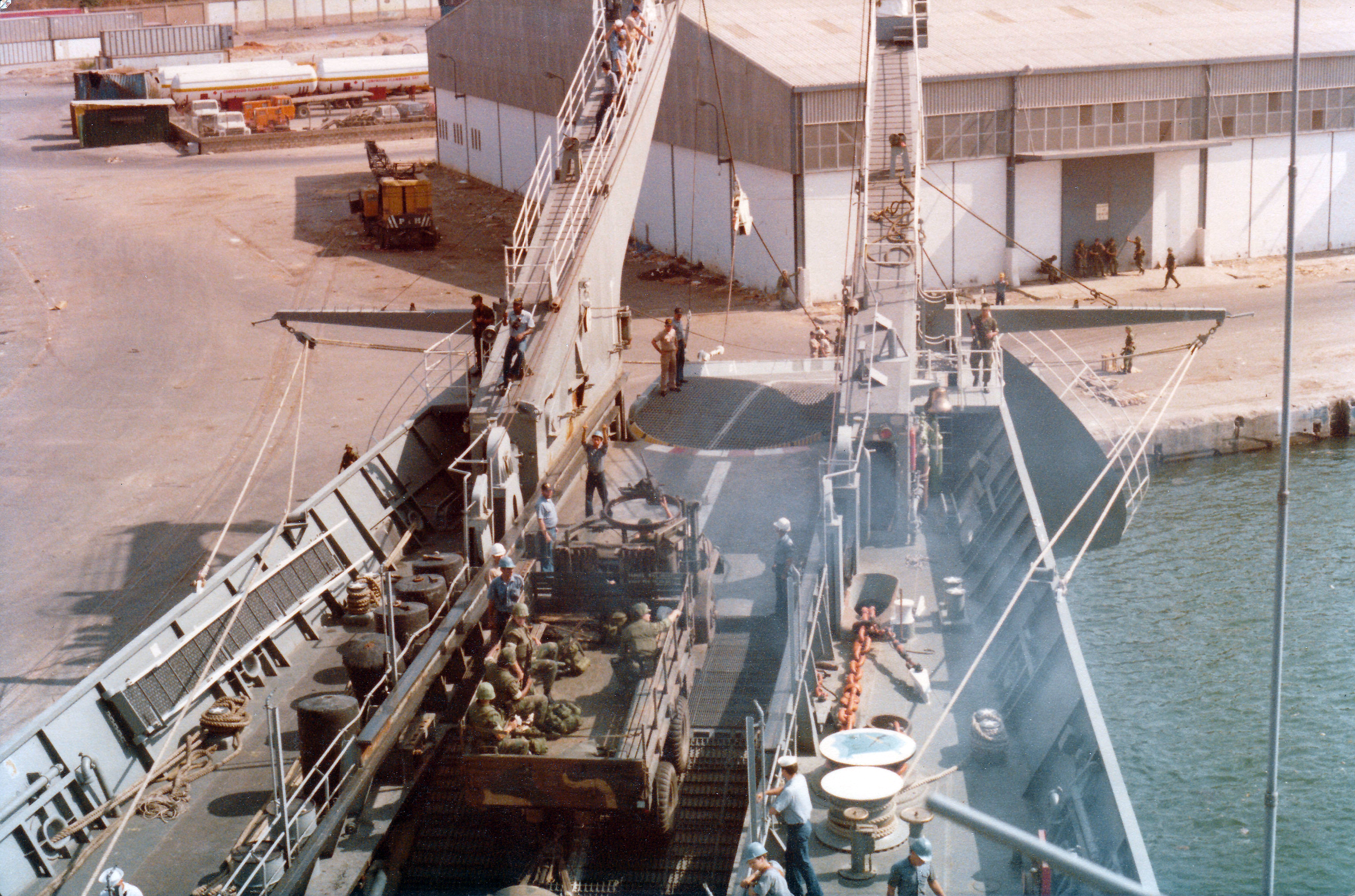 USS Saginaw, Beirut 1982.